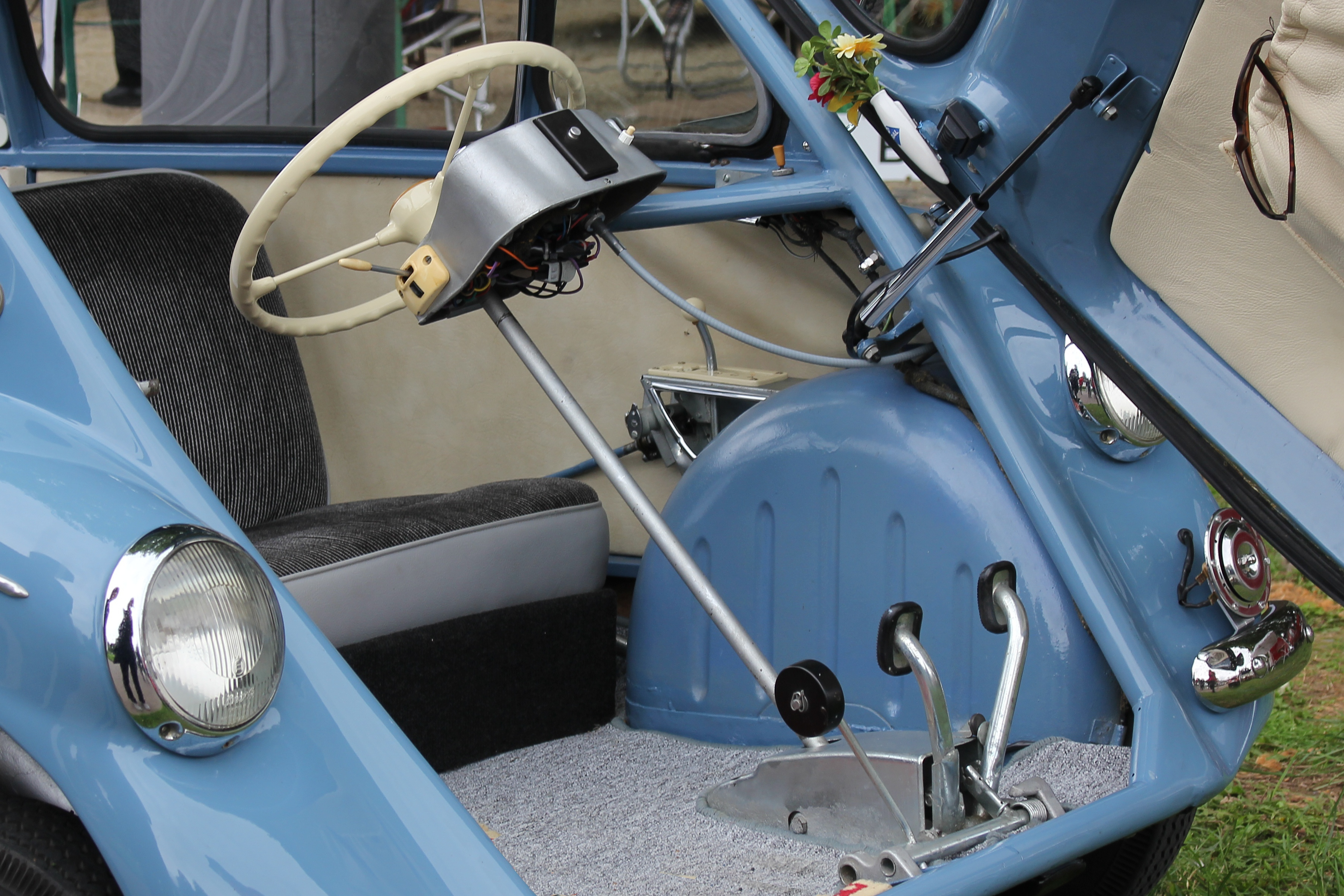 Heinkel Kabine 200, Typ 154, Baujahr 1957, 1-Zylinder-Viertaktmotor, 198 cm³, 10 PS bei 5500/min, 86 km/h; 5537 Stück gebaut